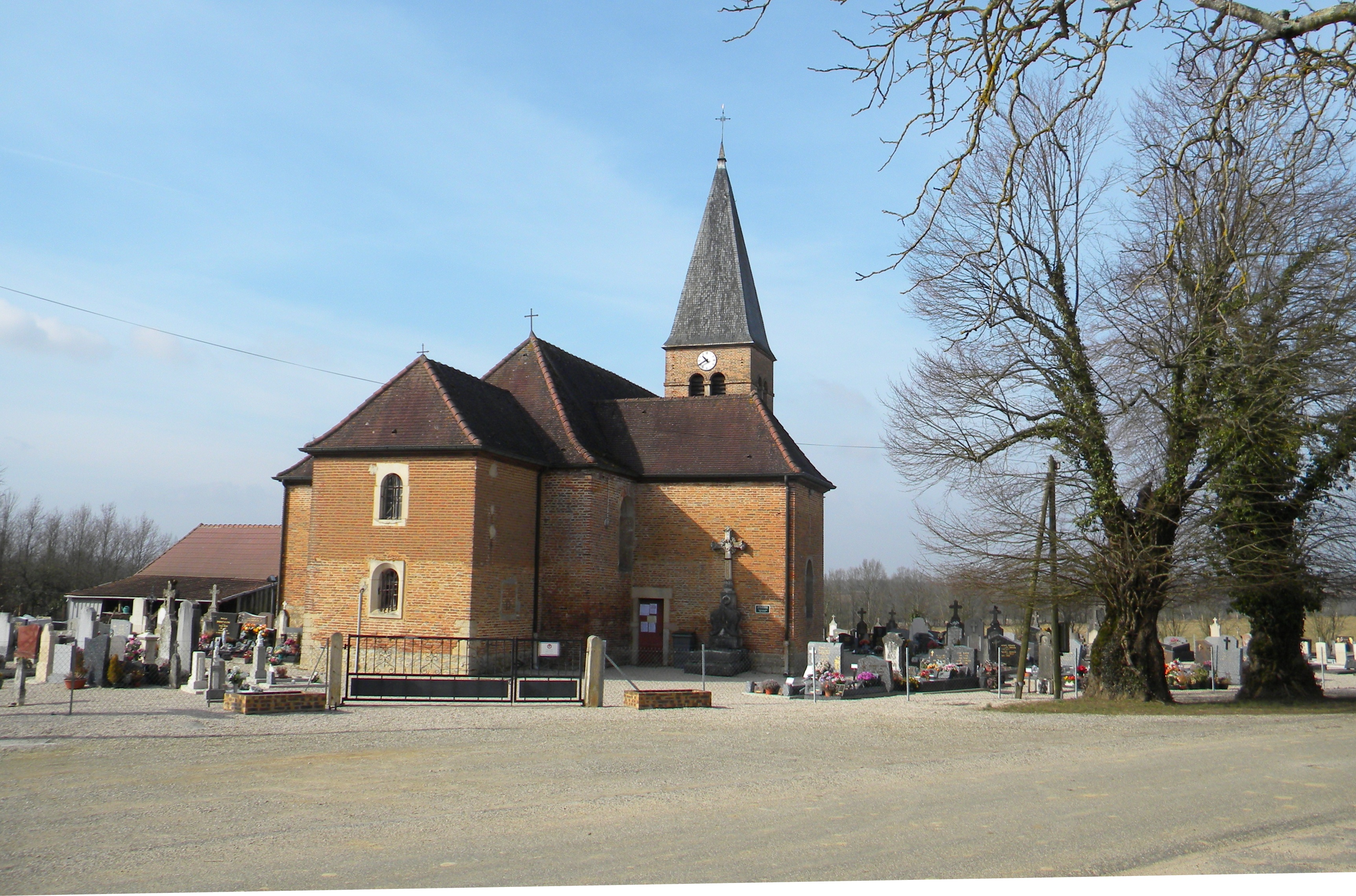 Eglise de Montcony